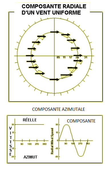 Diagramme qui montre la variation cosinuïdale de la partie radiale à un radar d'un vent uniforme. Un radar à impulsion ne voir que la différence en position radaiale entre deux impulsions ce qui veut dire qu'il verra un maximum de vitesse lorsqu'il regarde dans le vent mais zéro lorsque le vent est tangentiel au faisceau radar. Le diagramme du haut montre la composante projeté sur la direction du faisceau radar et celui du bas, la variation en sinus par raport au Nord mais en cosinus par rapport au faisceau radar. Diagramme que j'ai importé dans Common en février et que je viens de traduire pour le wiki francophone. Pierre cb 2 septembre 2006 à 20:11 (CEST)